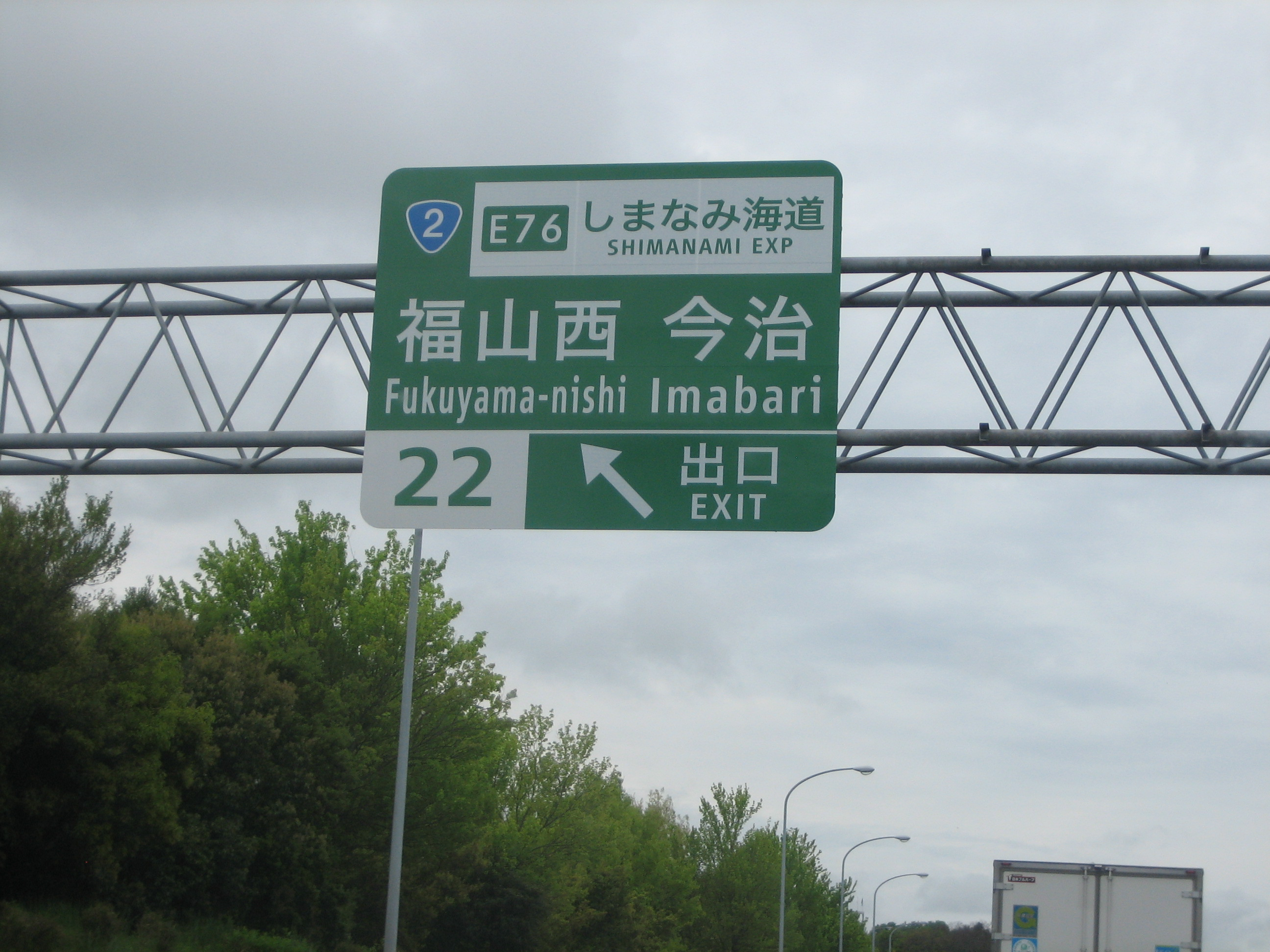 福山西IC